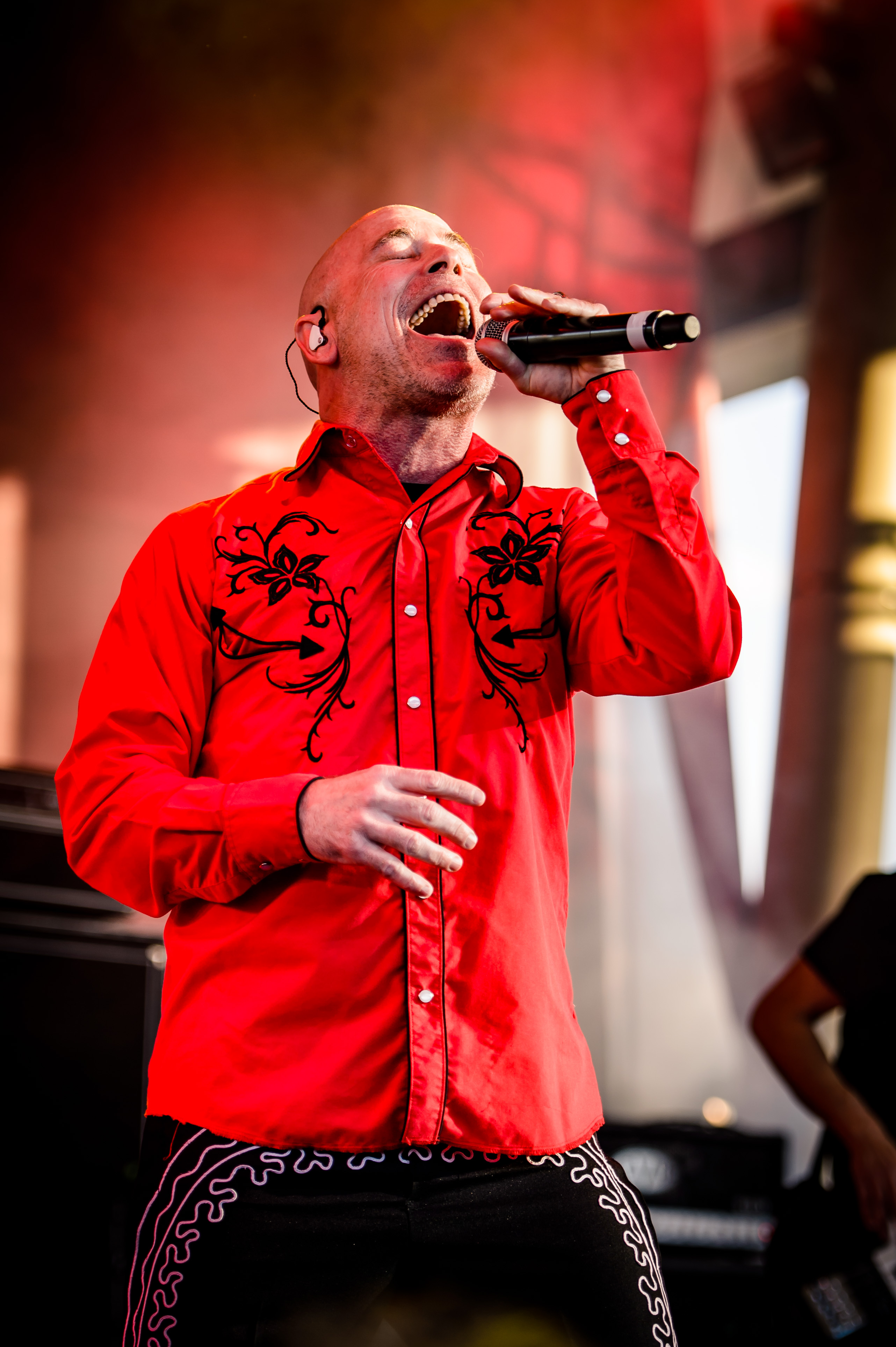 'Rock Hard Festival 2018; Amphitheater Gelsenkirchen': 'Armored Saint'